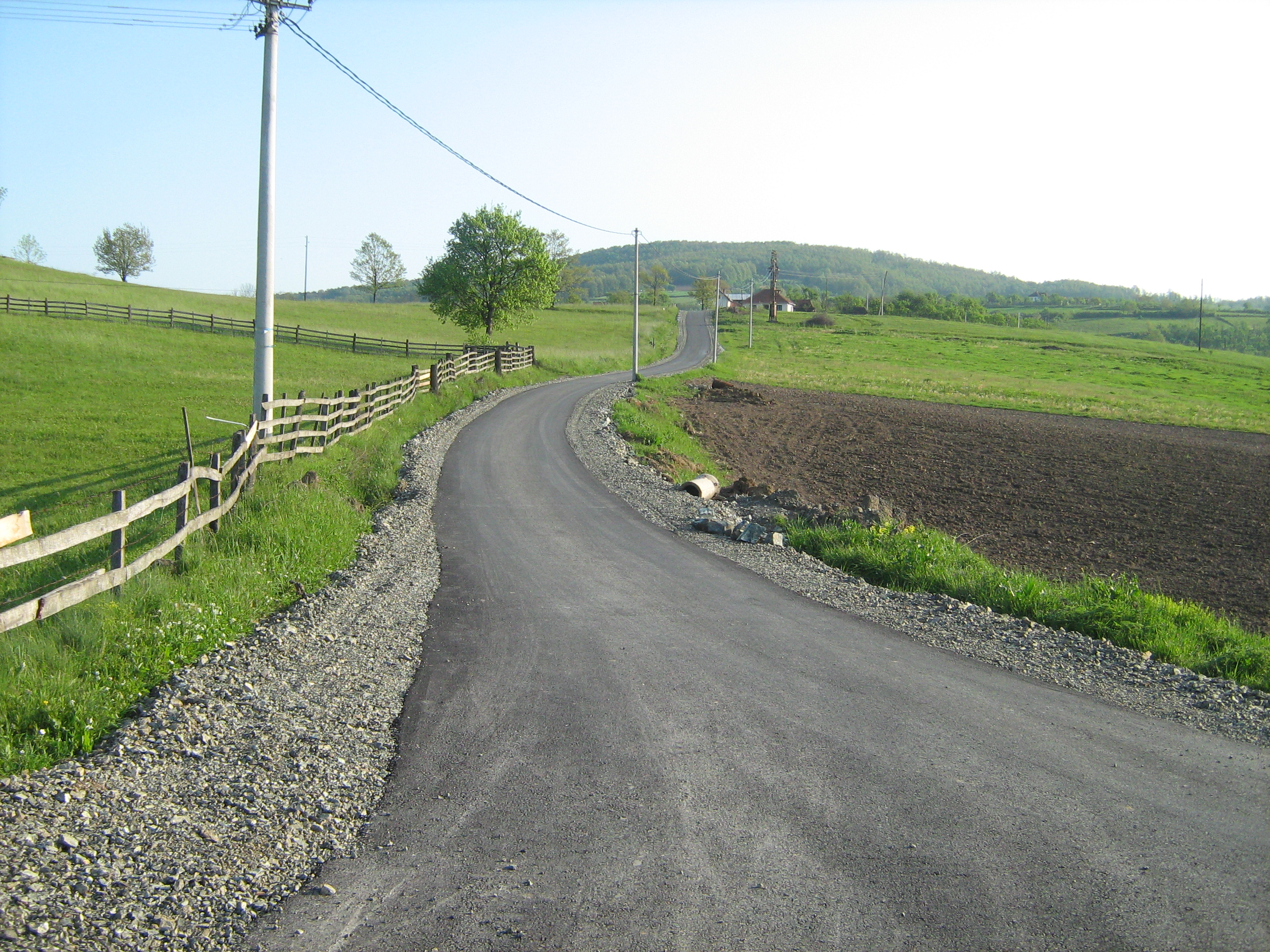 Деоница пута од Јечмине поре гробља која даље води до Станкића извора, свеже асфалтирана.